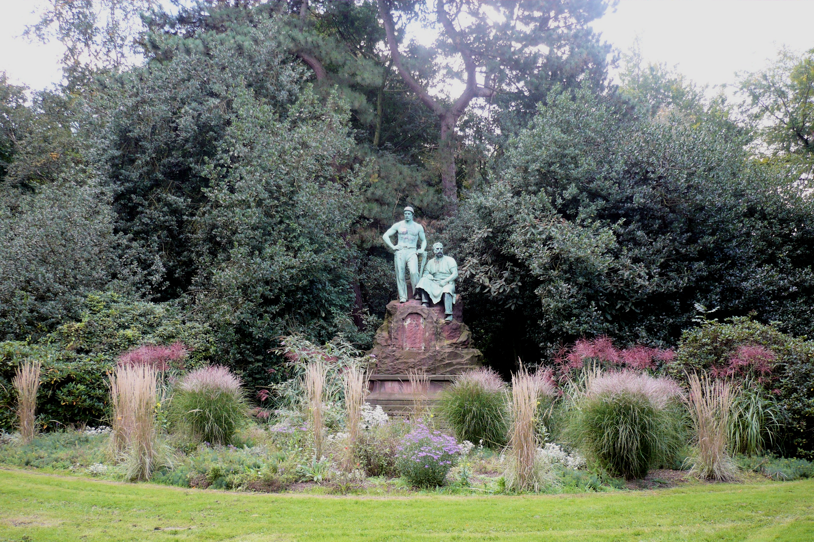 Denkmal im Kaiser-Wilhelm-Park in Essen-Altenessen; zeigt Kaiser Wilhelm I. mit einem Arbeiter